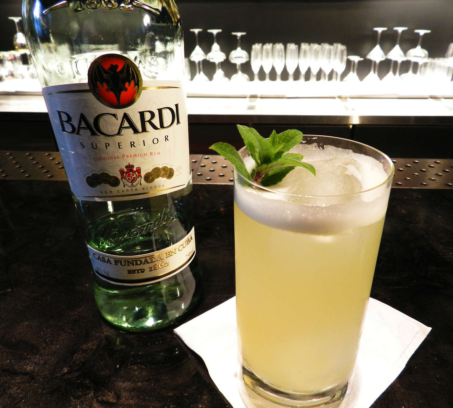 Este Cocktail se creó para el certamen Bacardi Legacy Cocktail Competition 2012. El nombre del cocktail fue inspirado en la historia, tradición e identidad de Puerto Rico. Descubrí, investigando lugares histórico, una Capilla, cuya ubicación se encuentra en la Ciudad Amurallada del Viejo San Juan (Capital de Puerto Rico). Esta capilla se encuentra al final de la calle del Cristo junto a la plaza Las Palomas, cuyo nombre es Capilla del Cristo de los Milagros, de ahí su nombre "Milagrito", alegre y fácil de recordar. Del mismo modo me base para la invención de este cocktail y fui a las bases de la cocktelería clásica caribeña. El Mojito, el Daiquiri, la Piña Colada, de esta trinidad, debe de surgir el nuevo cocktail legado. Y efectivamente nació "Milagrito". "Milagrito" es un cocktail fácil de beber, creado para disfrutar en todo momento y muy sencillo de maridar. fresco, frutal y sencillo de realizar.